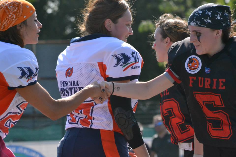 I quarterback si stringono la mano prima della partita